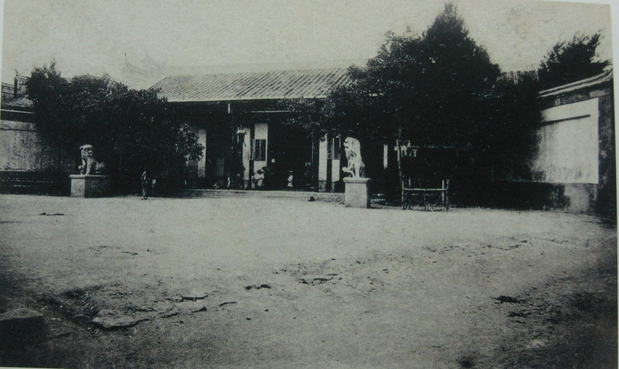 清朝的澎湖廳衙門